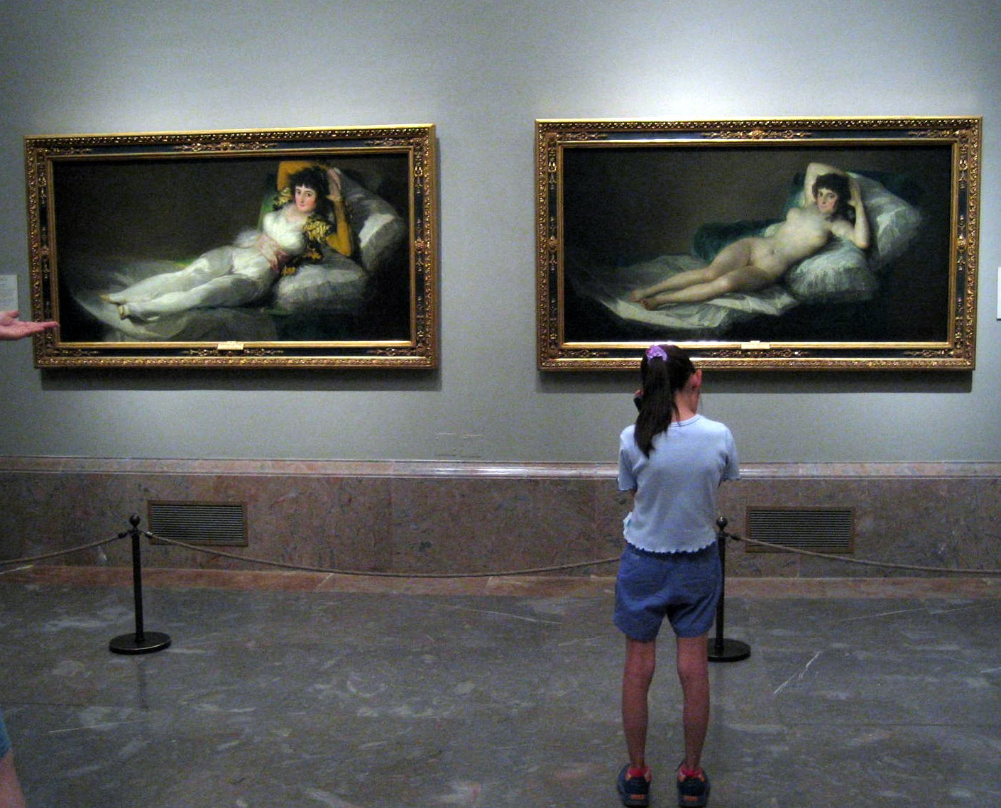 Una visitadora demivestida, delante de las imagines